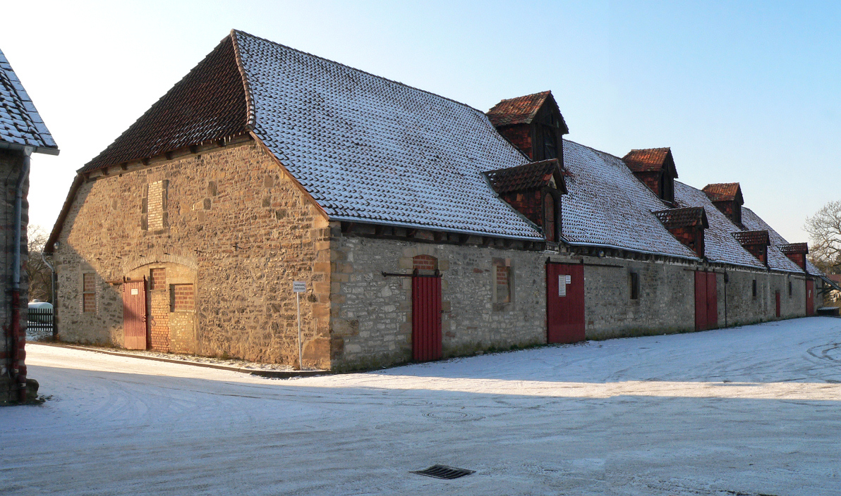 Burg Gebhardshagen, Wirtschaftsgebäude der Domäne